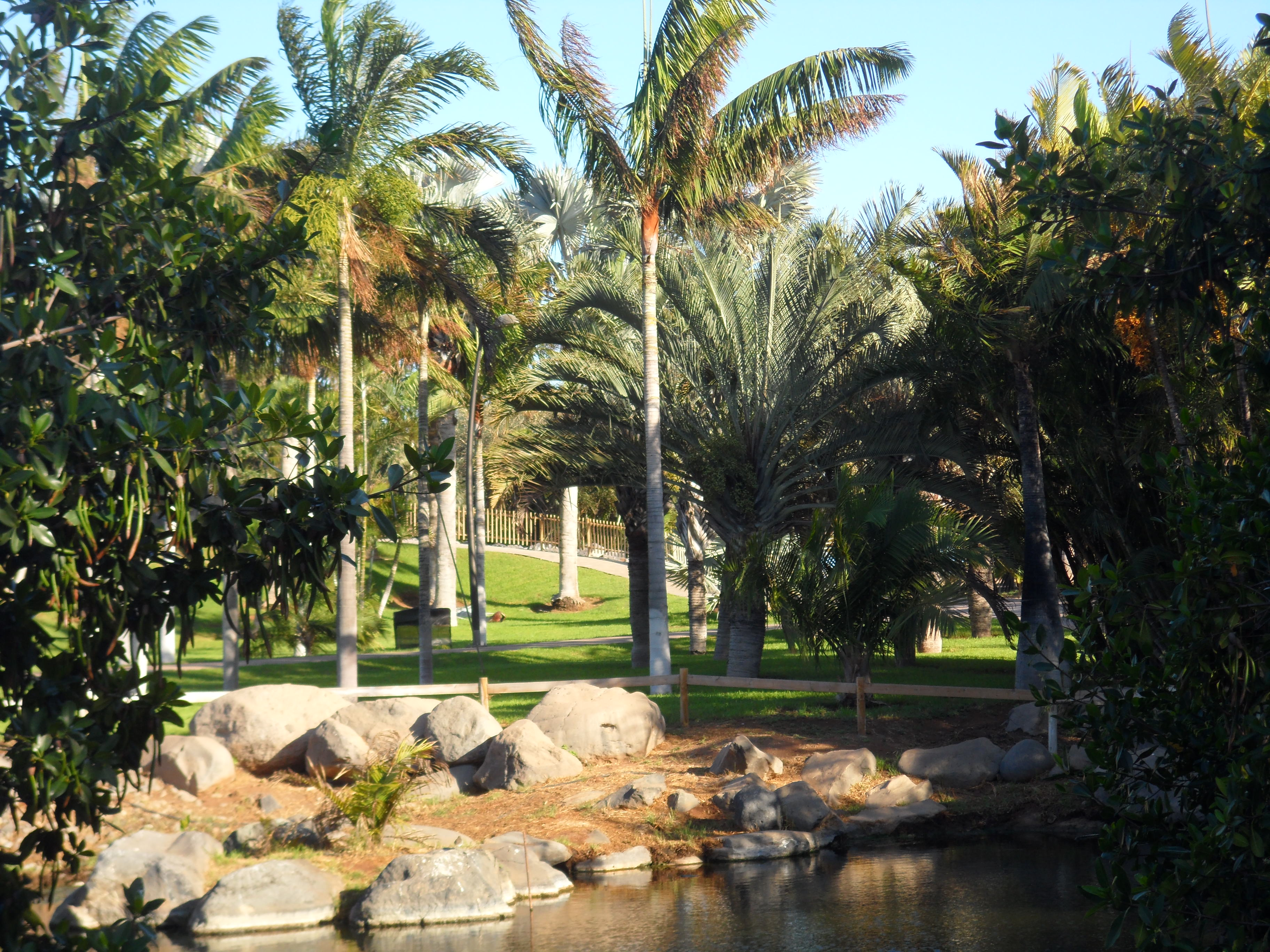 Palmetum Tenerife zona Madagascar.